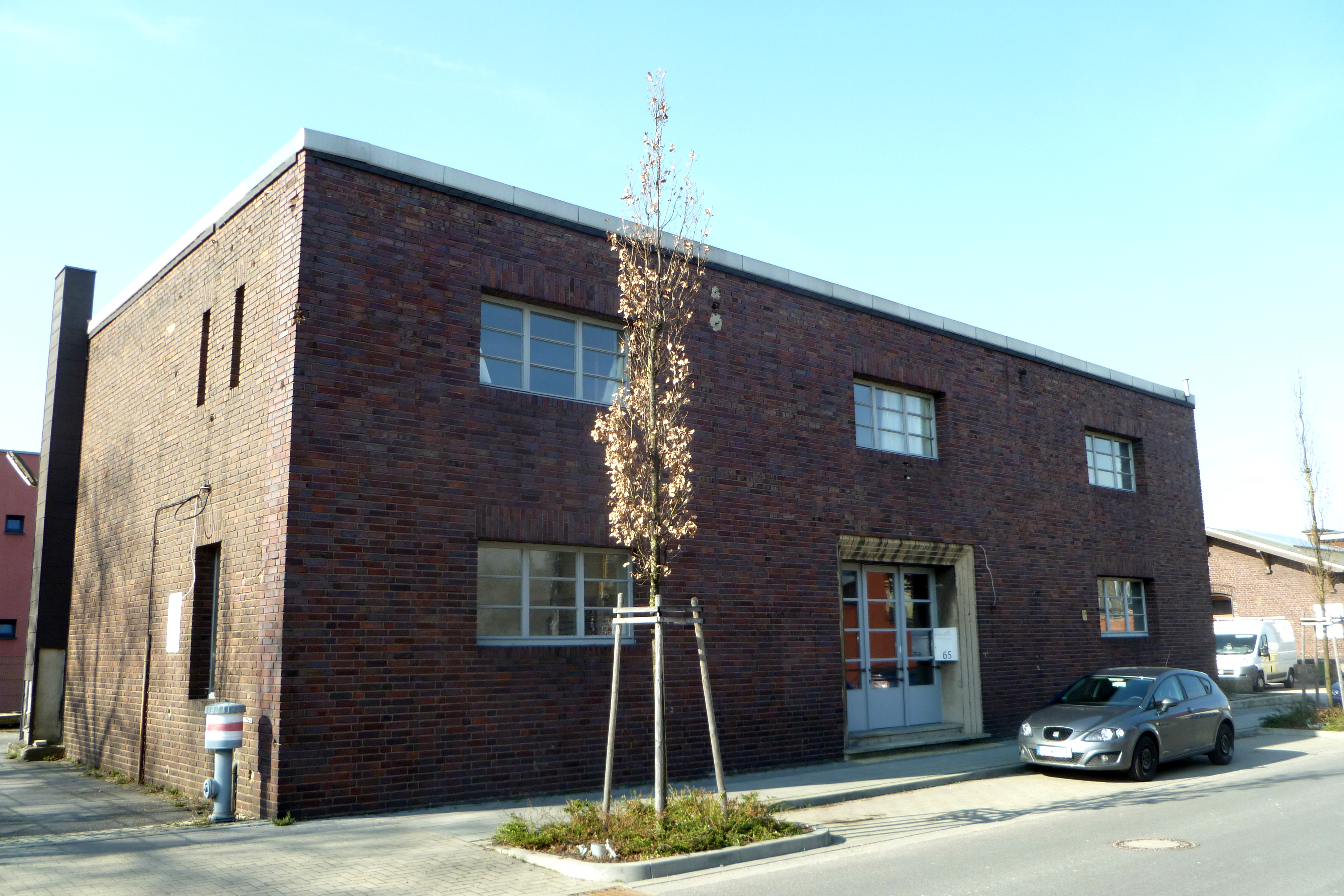 Alter Schlachthof Aachen - Schauamt; Baudenkmal